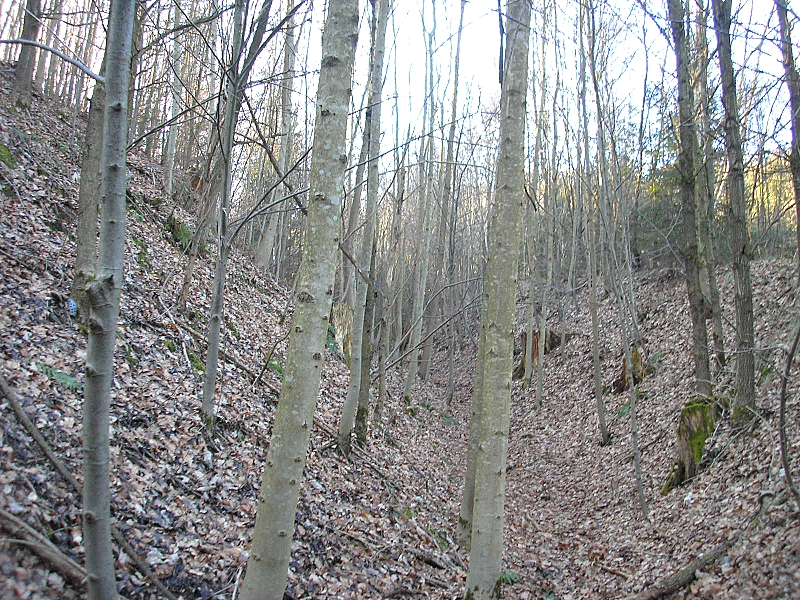 Burgstall "im Viehtrieb" bei Straßberg (Stadt Bobingen, Landkreis Augsburg, Bayerisch-Schwaben). Der nördliche Graben nach Nordwesten. Eigene Aufnahme, Feb. 2008 / Former castle or hill fort "im Viehtrieb" near Straßberg (Bobingen near Augsburg, Bavaria, Germany). The northern moat, looking north west. Own photo, Feb. 2008